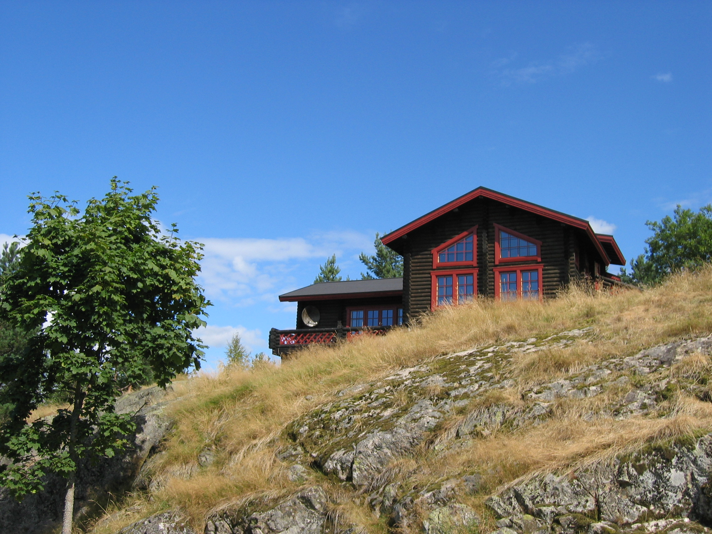 Låven på Færsnes Gjestegård